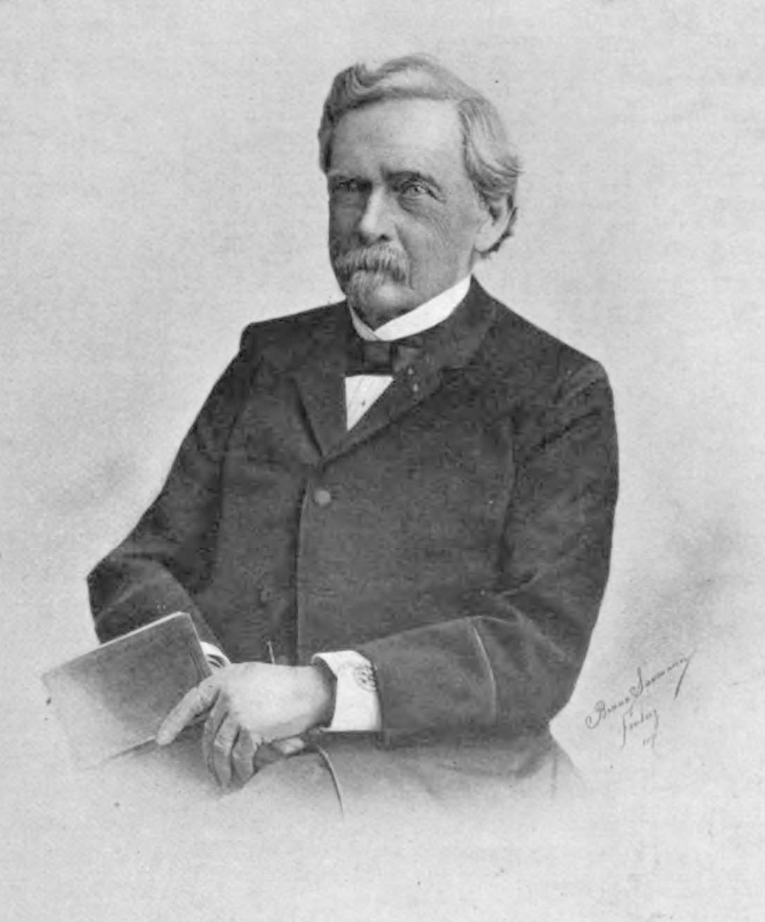 Heinrich Gerlach. In: Mitteilungen des Freiberger Altertumsvereins. Konrad Knebl (Hrsg.) Heft 35-1898